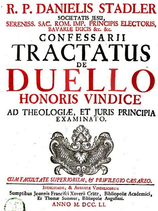 Buchtitelblatt Daniel Stadler, Jesuit (1705-1764) Beichtvater und Berater des Bayerischen Kurfürsten Max III. Joseph